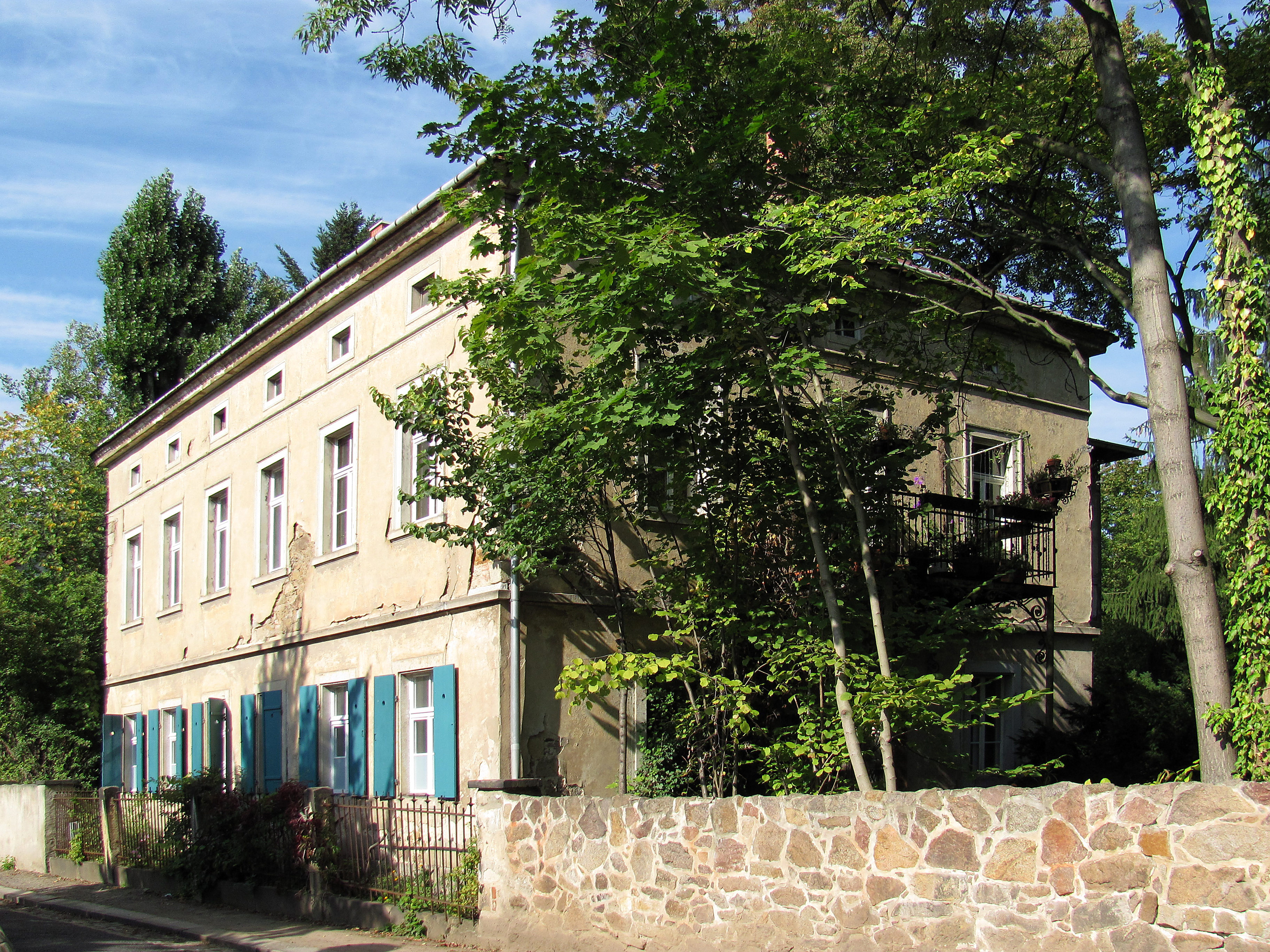 Radebeul, Haus Leonhardt, Haupthaus